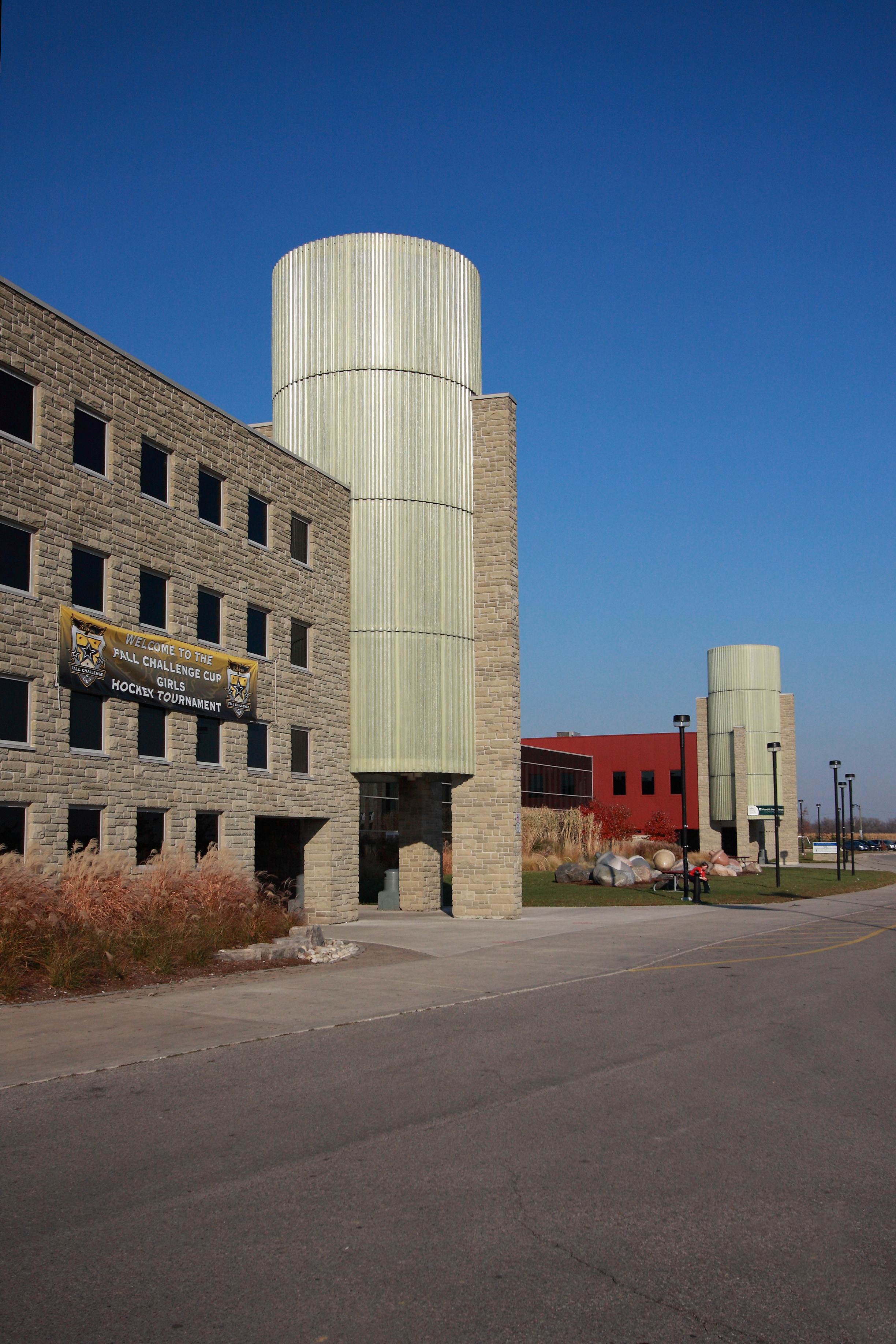 RIM Park, Waterloo